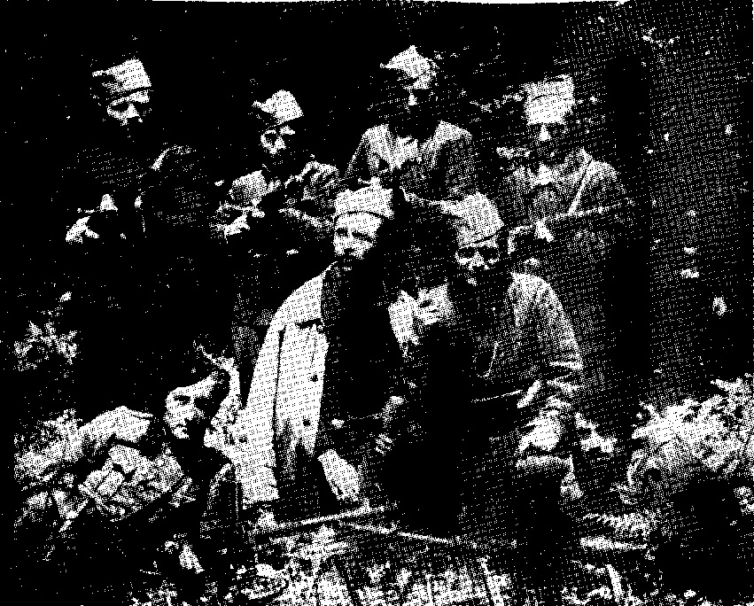 Srpski (latinica): U gornjem redu sa leva na desno: Dragoljub Dinić Mića, Radivoje Veljković Mališa, Živojin Đorđević Soko, Milovan Agatonović Šega;u drugom redu sa leva na desno: Aleksandar Ivanović Soko, Kiril Mihajlovski Grujica, Žika Čiklovan Svetozar и Andjelko Moravčić Aleksa